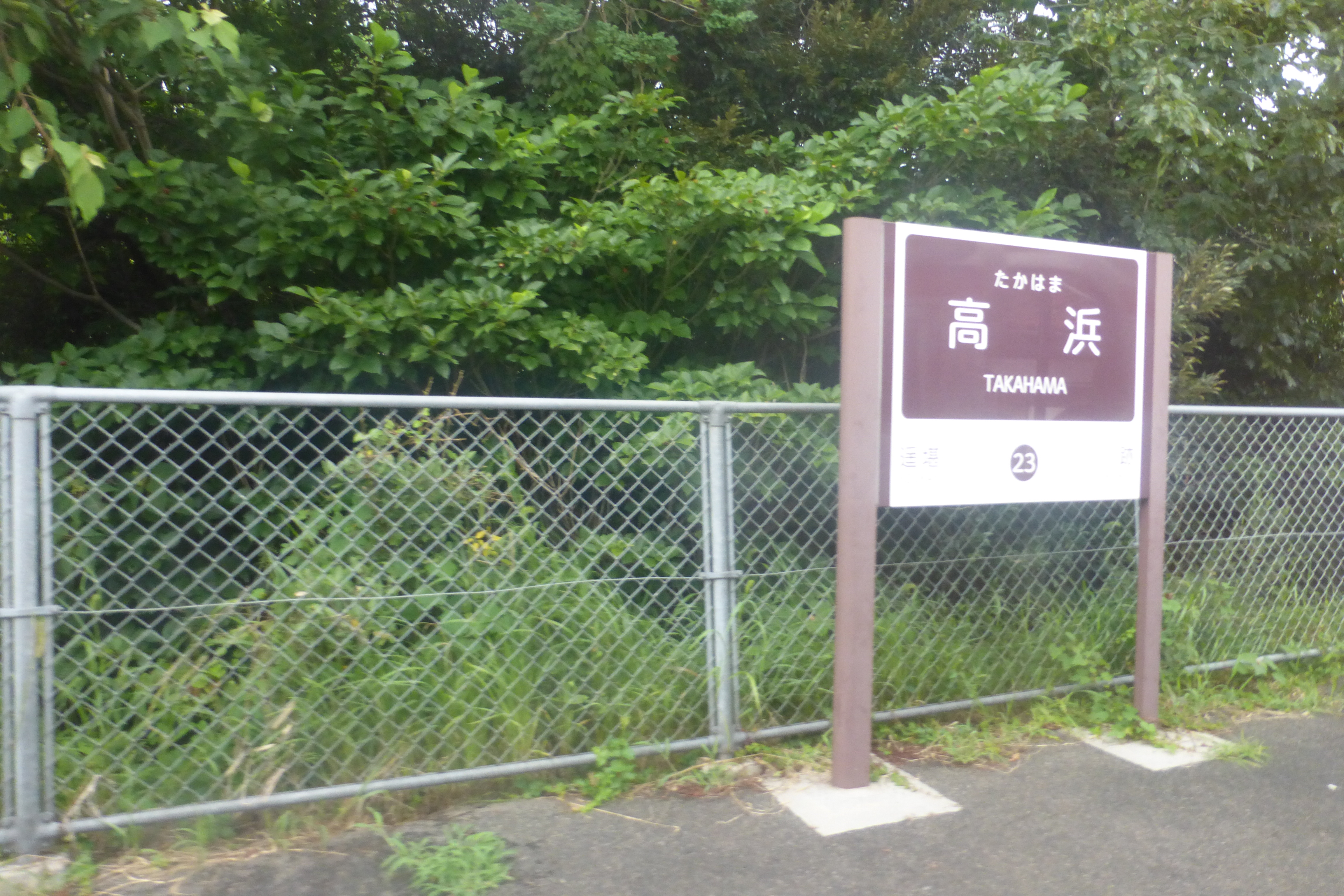 Takahama Station platform (高浜駅のホーム)